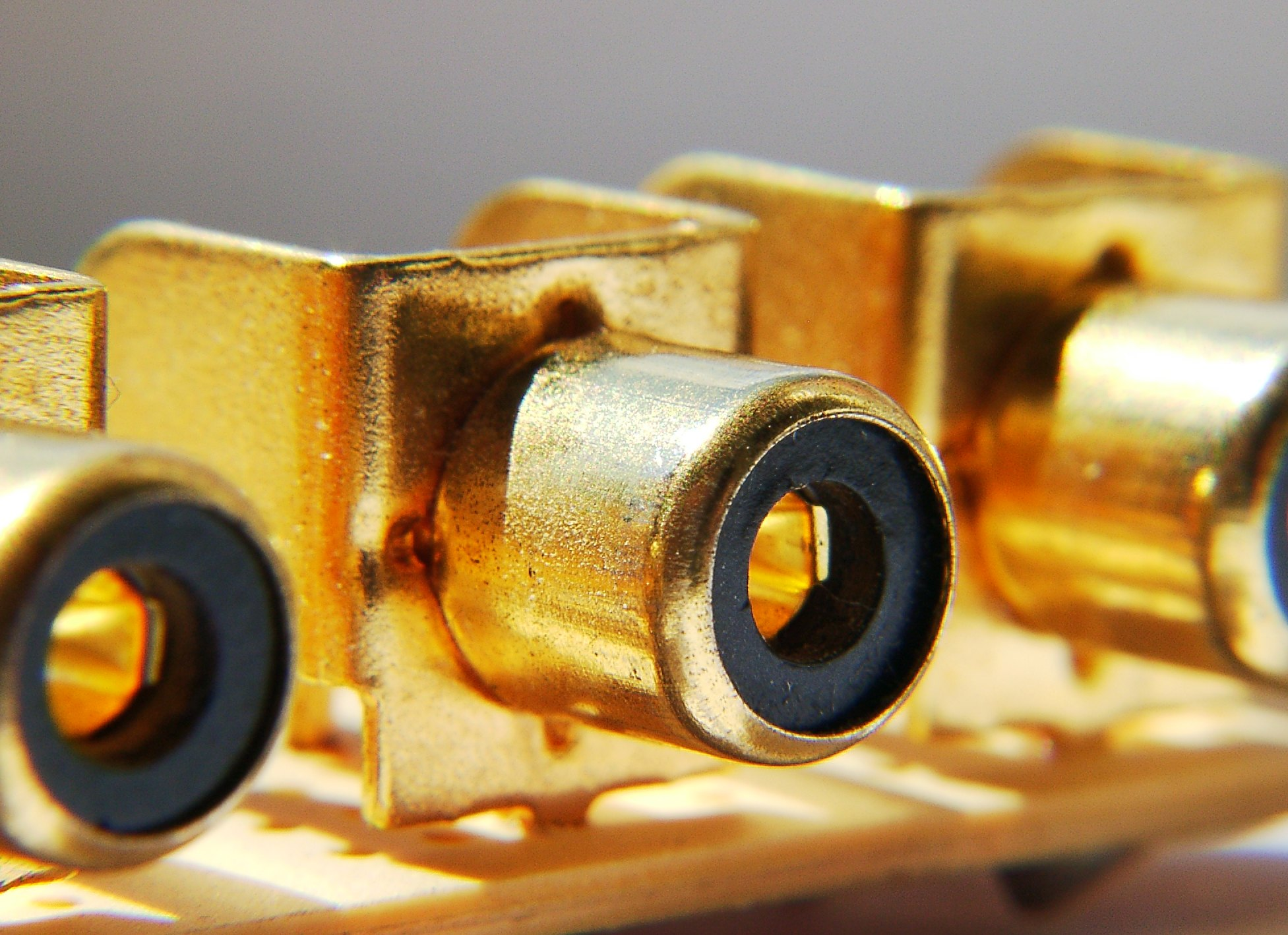 Vergoldete Cinch-Buchsen auf Platine Fotograf: Wollschaf